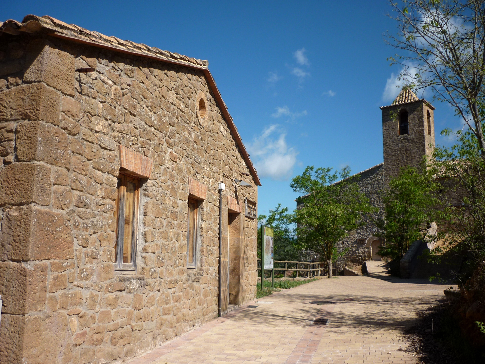 Escola Pública de la Torre de Rialb i església de Sant Iscle(la Baronia de Rialb)